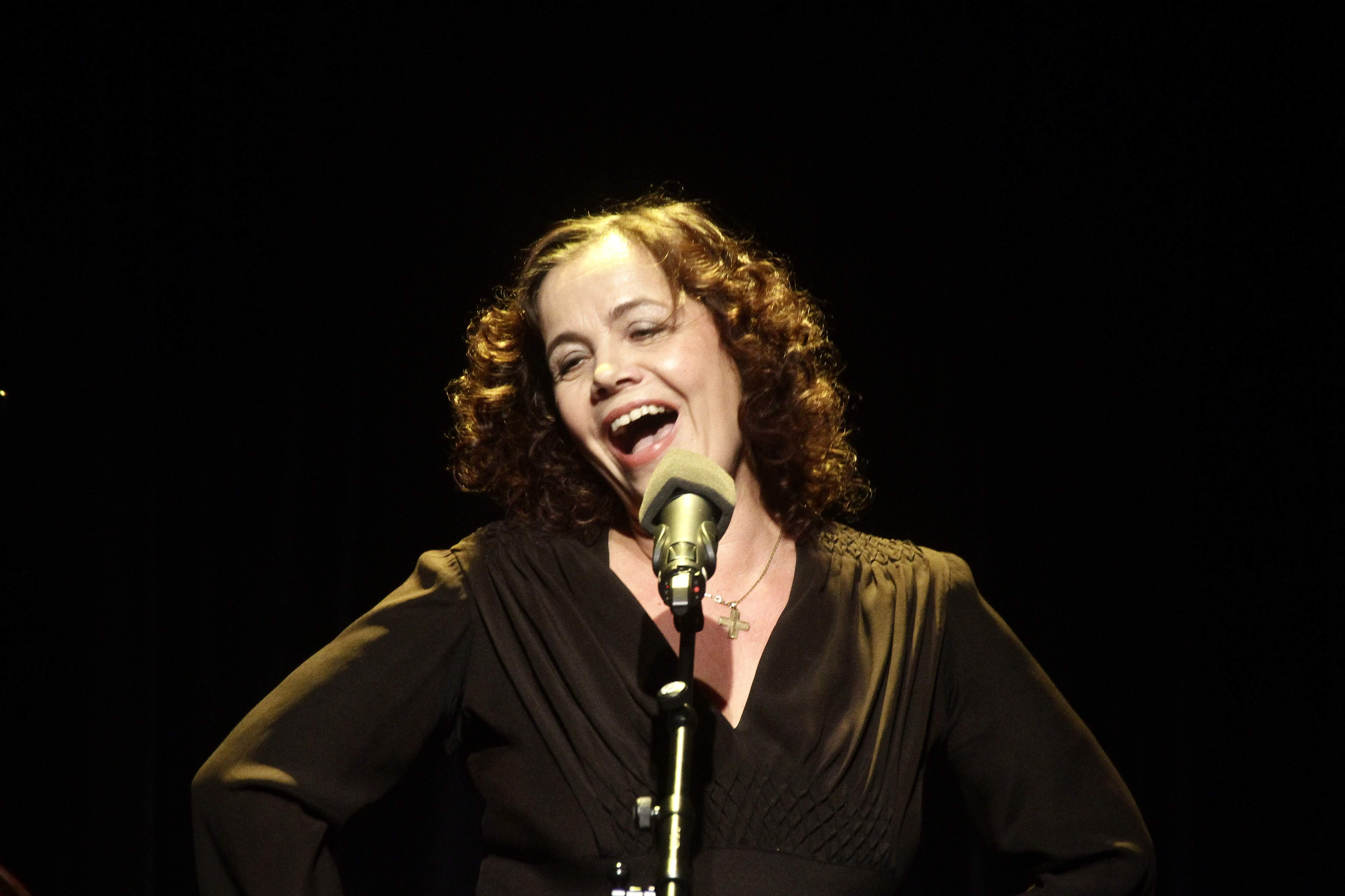 TREIBHAUS INNSBRUCK VOLLMOND Dez. 2018 Judith Keller singt PIAF, mit Michael Mader (Piano), Harald Pröckl (Akkordeon), Andreas Flemming (Kontrabass.) Vollmond, Eintritt frei. https\:// Fotos: Chris Niewo